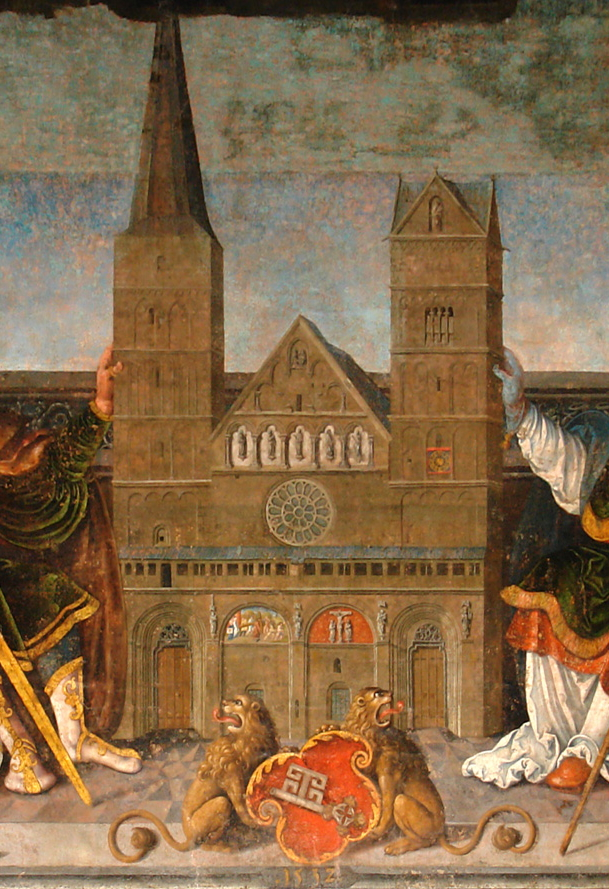 Rathaus in Bremen: Fresco des niederrheinischen Meisters Bartholomäus Bruyn von 1532 in der Oberen Halle. Es zeigt symbolisch die Gründung des Bistums Bremen durch Kaiser Karl den Großen, der Bischof Willehad das Bistum überträgt; ein Modell des Bremer Doms – in seiner Form von 1532 – befindet sich zwischen den Beiden. (Aufnahme perspektivisch entzerrt)